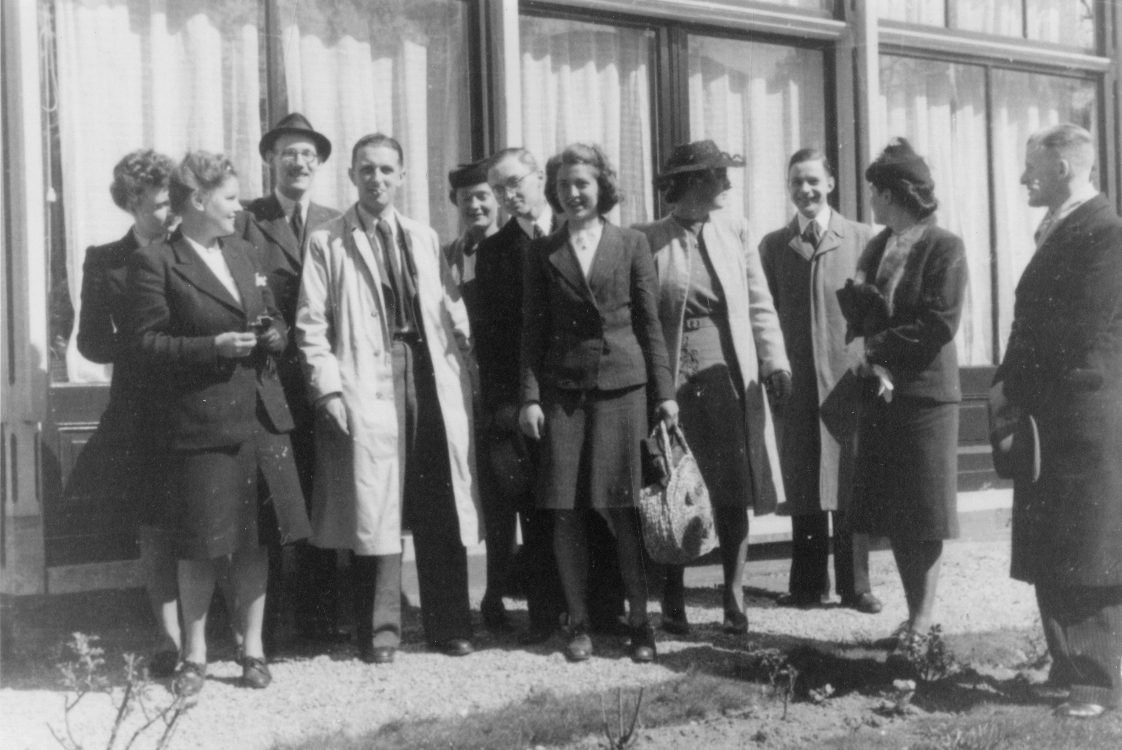 Enkele leden van het Kindercomité, een verzetsgroep te Utrecht die zorgde voor het laten onderduiken van Joodse kinderen, op de huwelijksreceptie van Geert Lubberhuizen; v.l.n.r. Titie Timmenga, Annie de Waard, dr. Ger Kempe, Manfred Lewinsohn, Olga Hudig, Rut Matthijsen, Dora Matthijssen, Ankie Stork en verder Ewoud Storm van 's-Gravesande en het echtpaar Vink. Verweesd werk 1.0. In ca. 1996 vervaardigde reproductie van een in mei 1945 gemaakte foto.De foto is gepubliceerd in: Bibl.HUA K 2006-105, T. Spaans - van der Bijl, Utrecht in verzet, 1940-1945 (2e druk), blz. 228.De laatste drie personen waren als bewoners van het huis Van Limburg Stirumstraat 19, waar de vervalsingscentrale van Rut Matthijsen en Geert Lubberhuizen was gevestigd, nauw betrokken bij het werk van het Kindercomité.